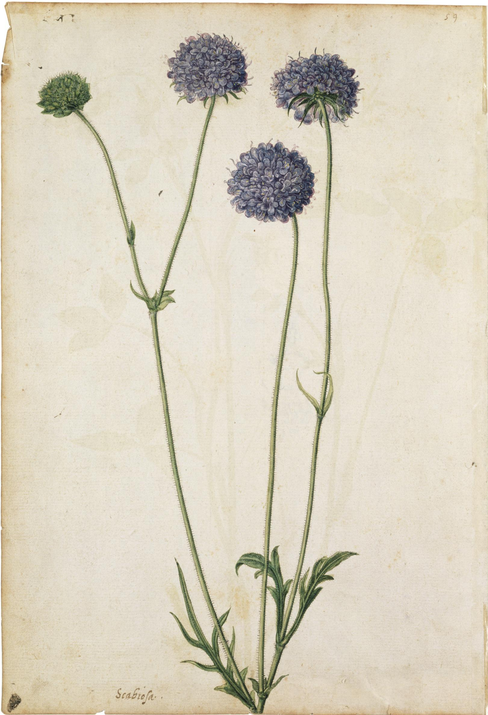 Жак Ле Муан. Паўночнік палявы